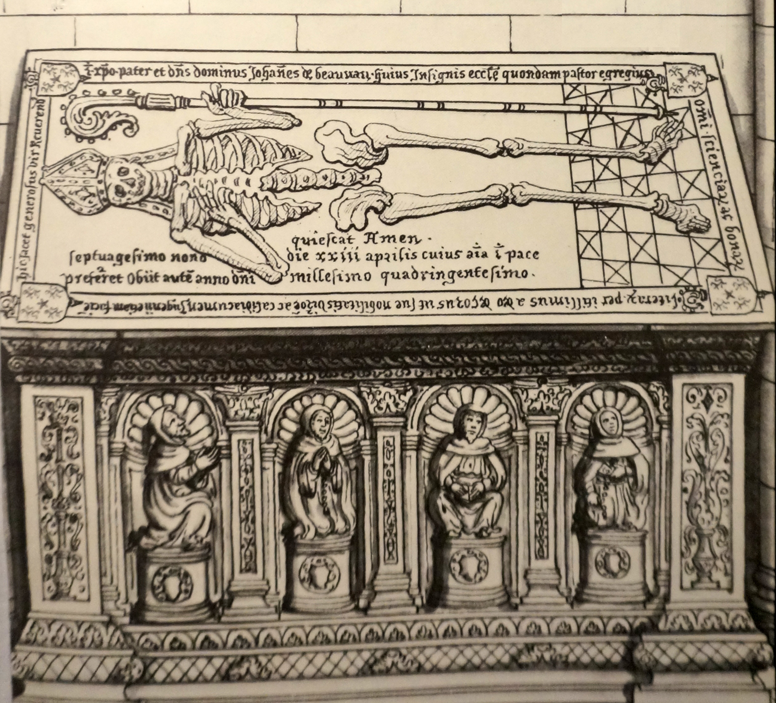 images collectées pour Gaignières se trouvant à la BNF numérisés par Gallica, lat.17030 fol.141.